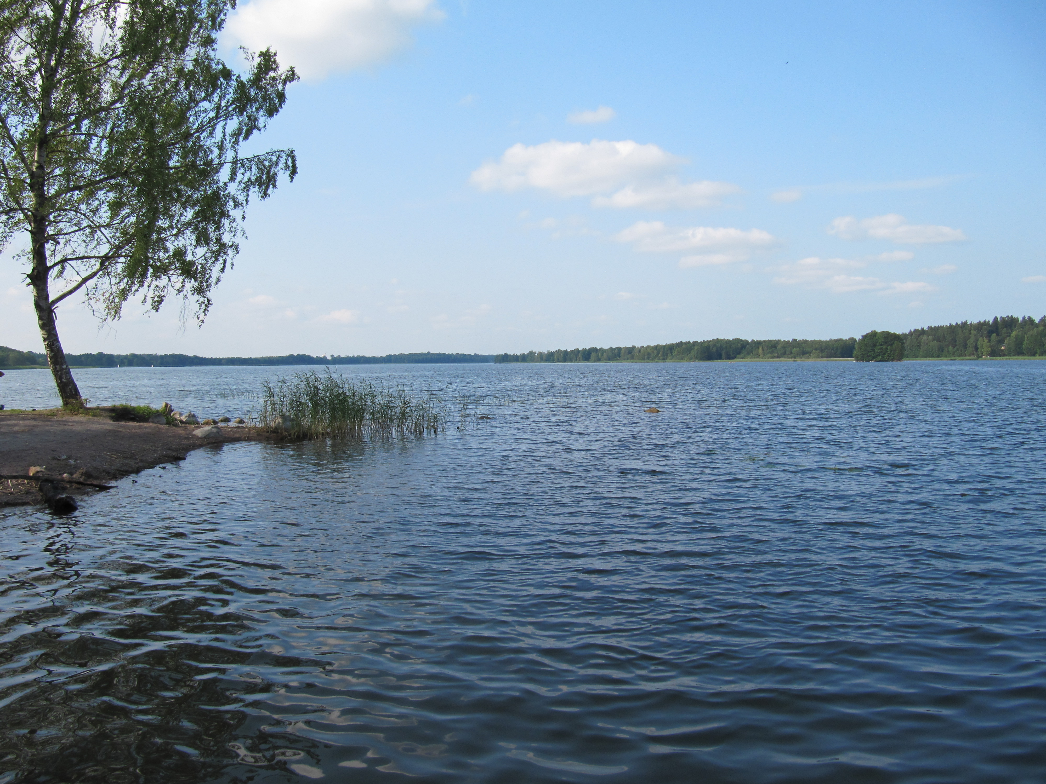 Bild från badplatsen vid södra delen av Långsjön.